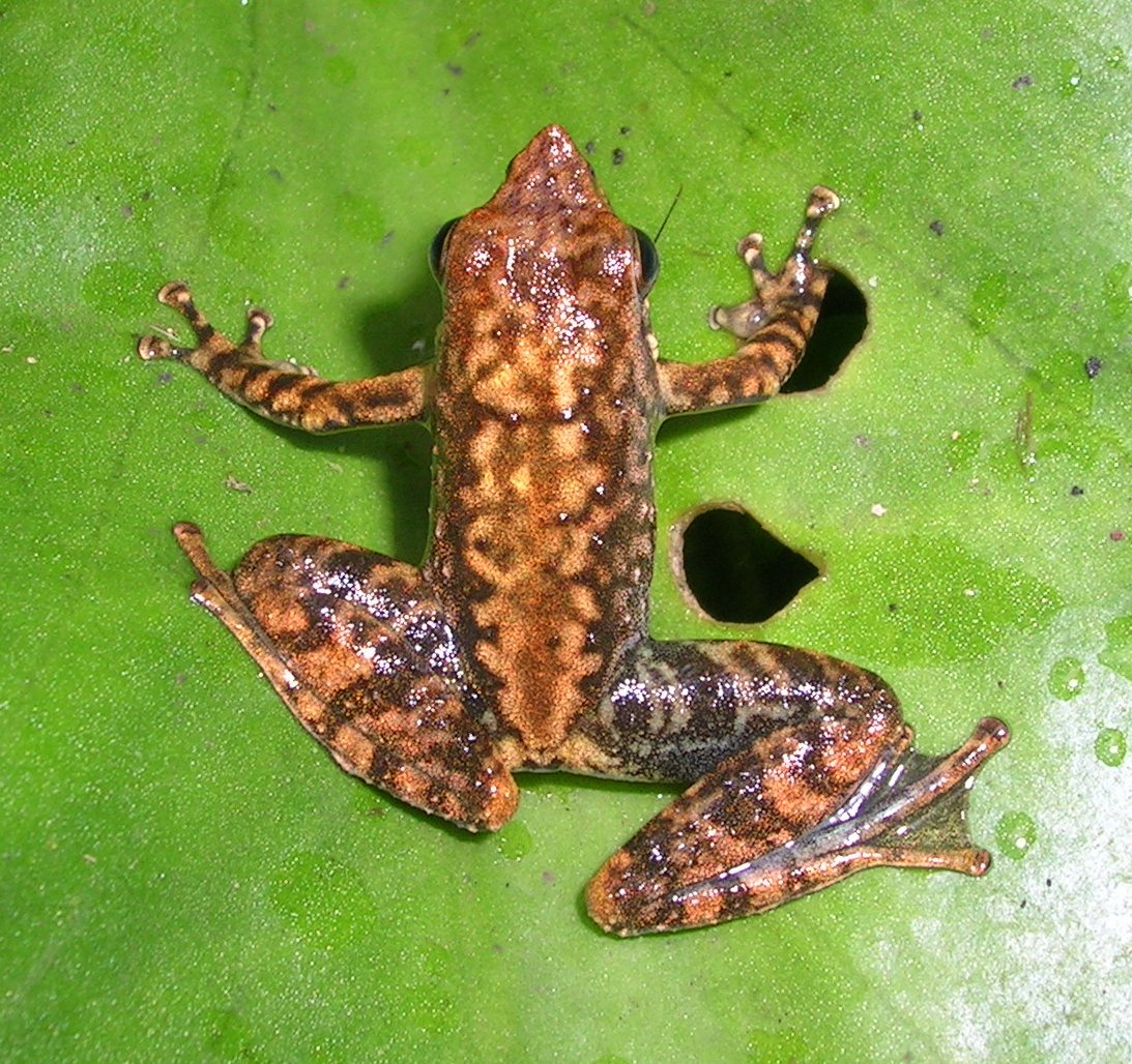 Micrixalus saxicola from Wayanad, Kerala, Oct 2007